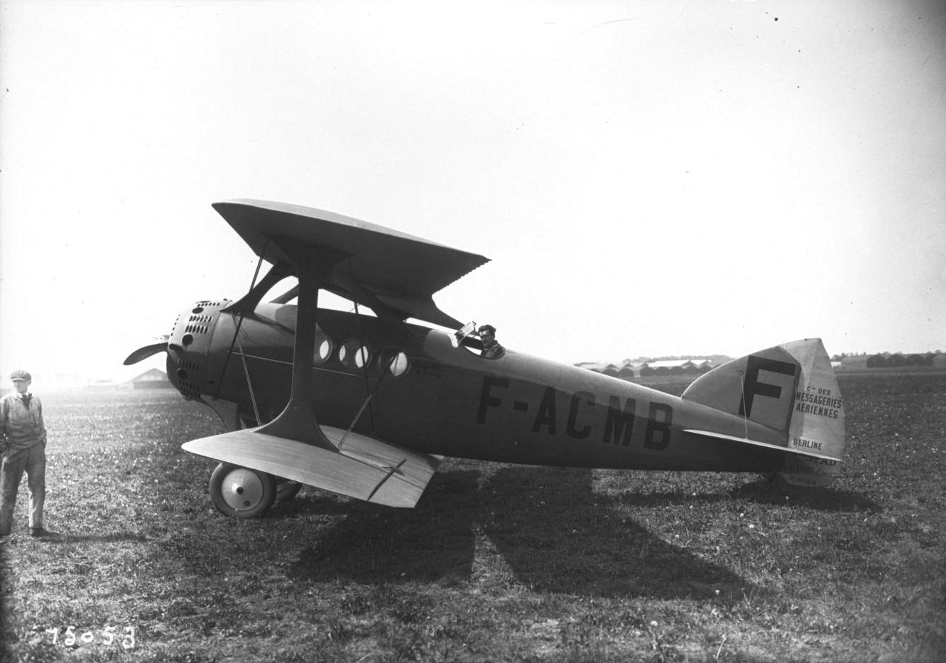 Avion Blériot-SPAD S.33